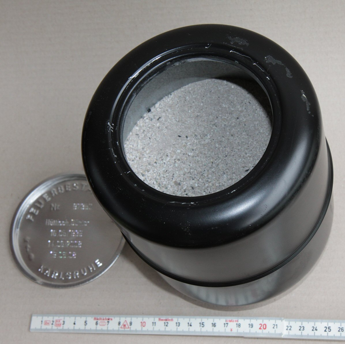 Blick in die normalerweise in einer Urne enthaltenen Aschenkapsel, man erkennt die darin enthaltene Totenasche. Der Blechdeckel zum Eindrücken enthält nach oben geprägte Schriftzeilen: als Kreis rundum "Feuerbestattung Karlsruhe" samt drei Zierzeichen; sowie mittenbündig 5 eingravierte Zeilen: "Nr. 92350", "Hüttisch, Günter", "16.05.1939" (Geburtsdatum), "14.06.2008" (Sterbedatum), "19.06.08" (Einäscherungsdatum).